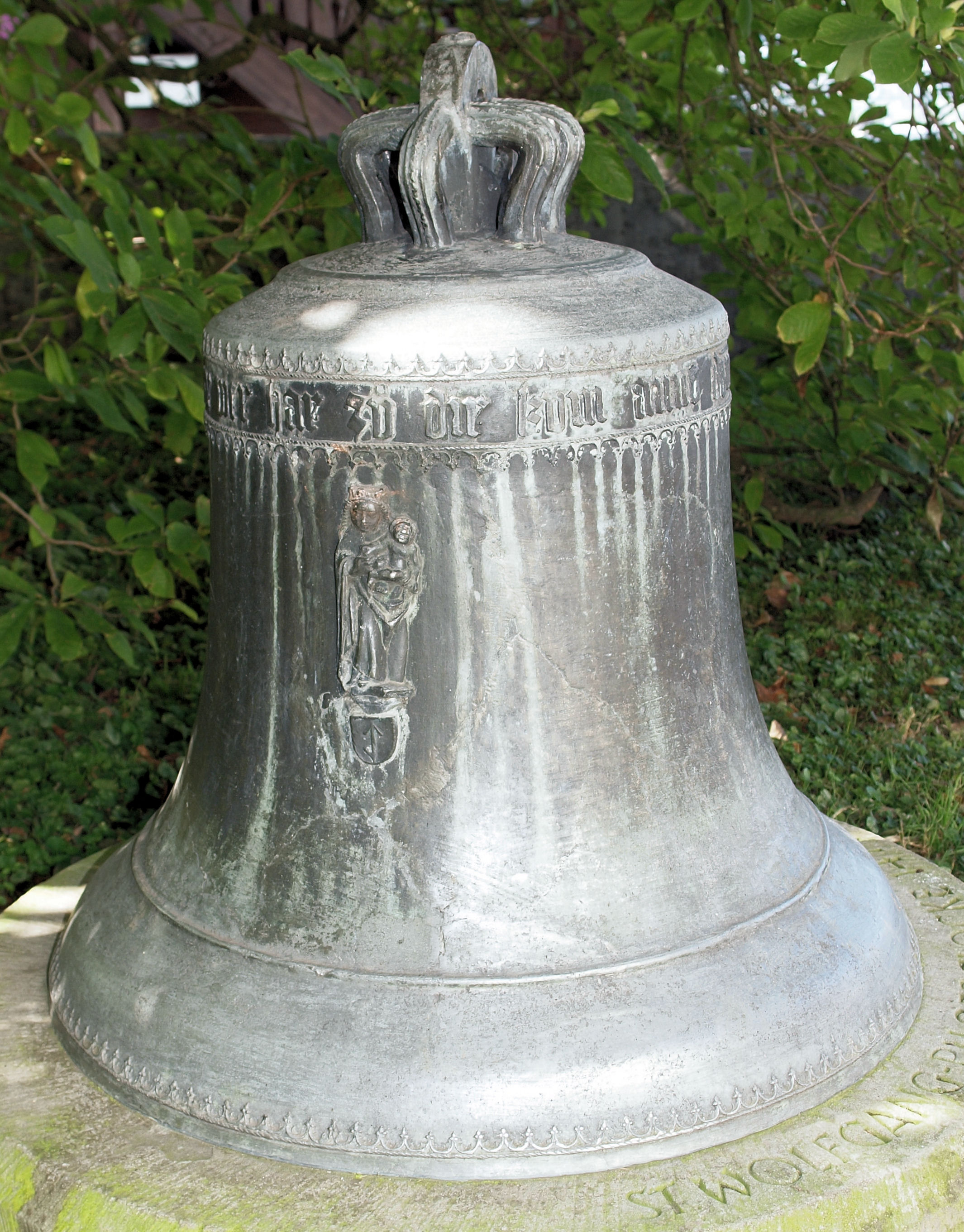 Die Wallfartsglocke der Kirche St. Wolfgang in Hünenberg SZ. Es handelt sich um die ehemals mittlere Glocke der Kirche. Sie wurde 1477 gegossen und wurde 1949 ersetzt. Sie befindet sich im Kirchhof der Kirche.